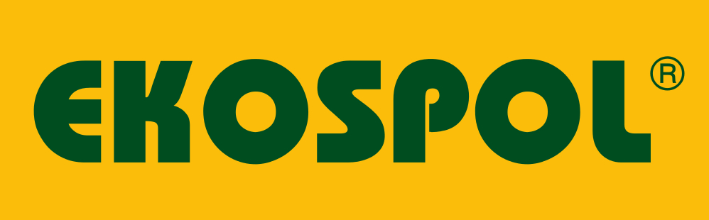 Logo EKOSPOL a.s.